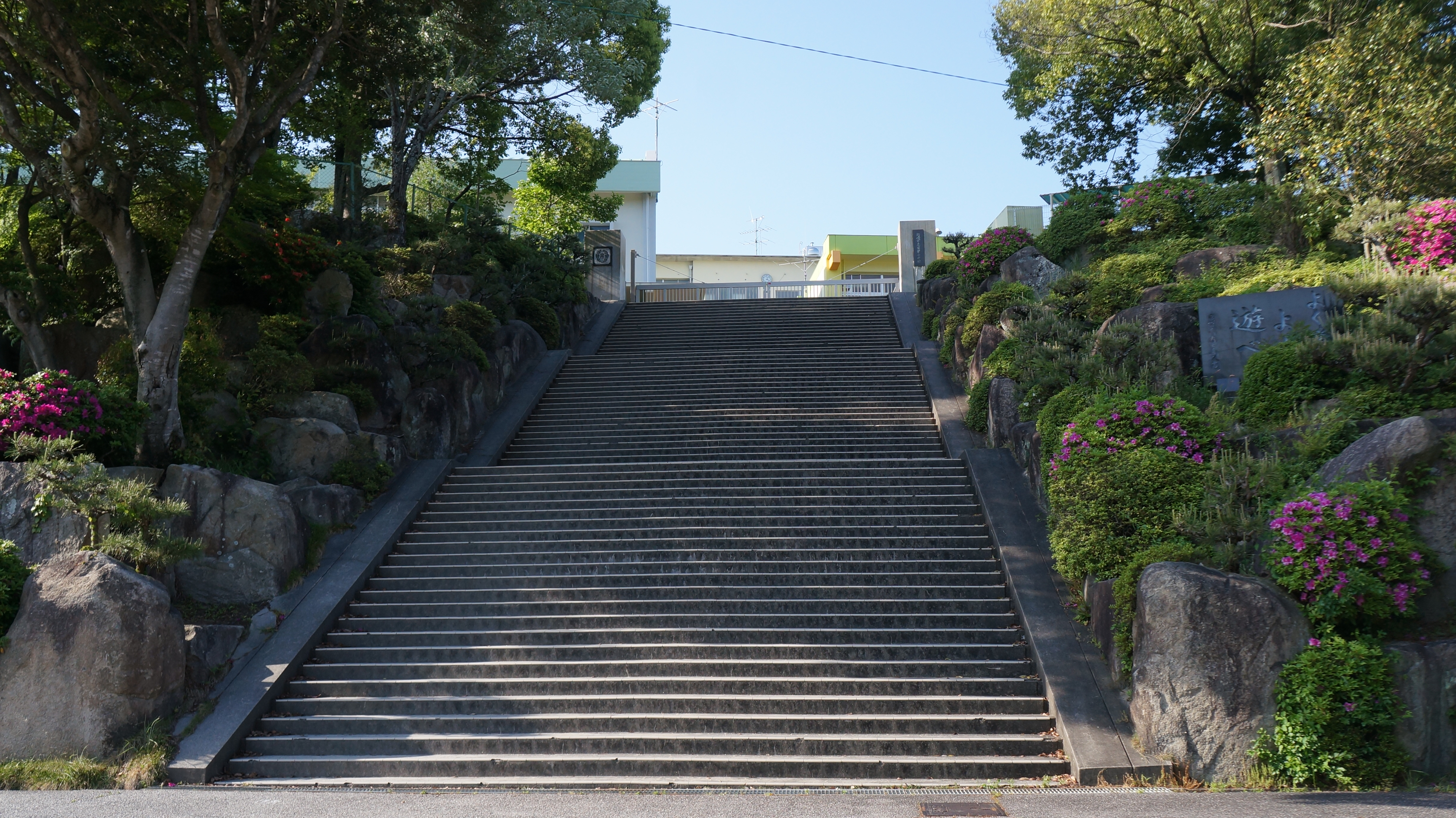 岡崎市立常磐小学校。階段を上ると正門がある。